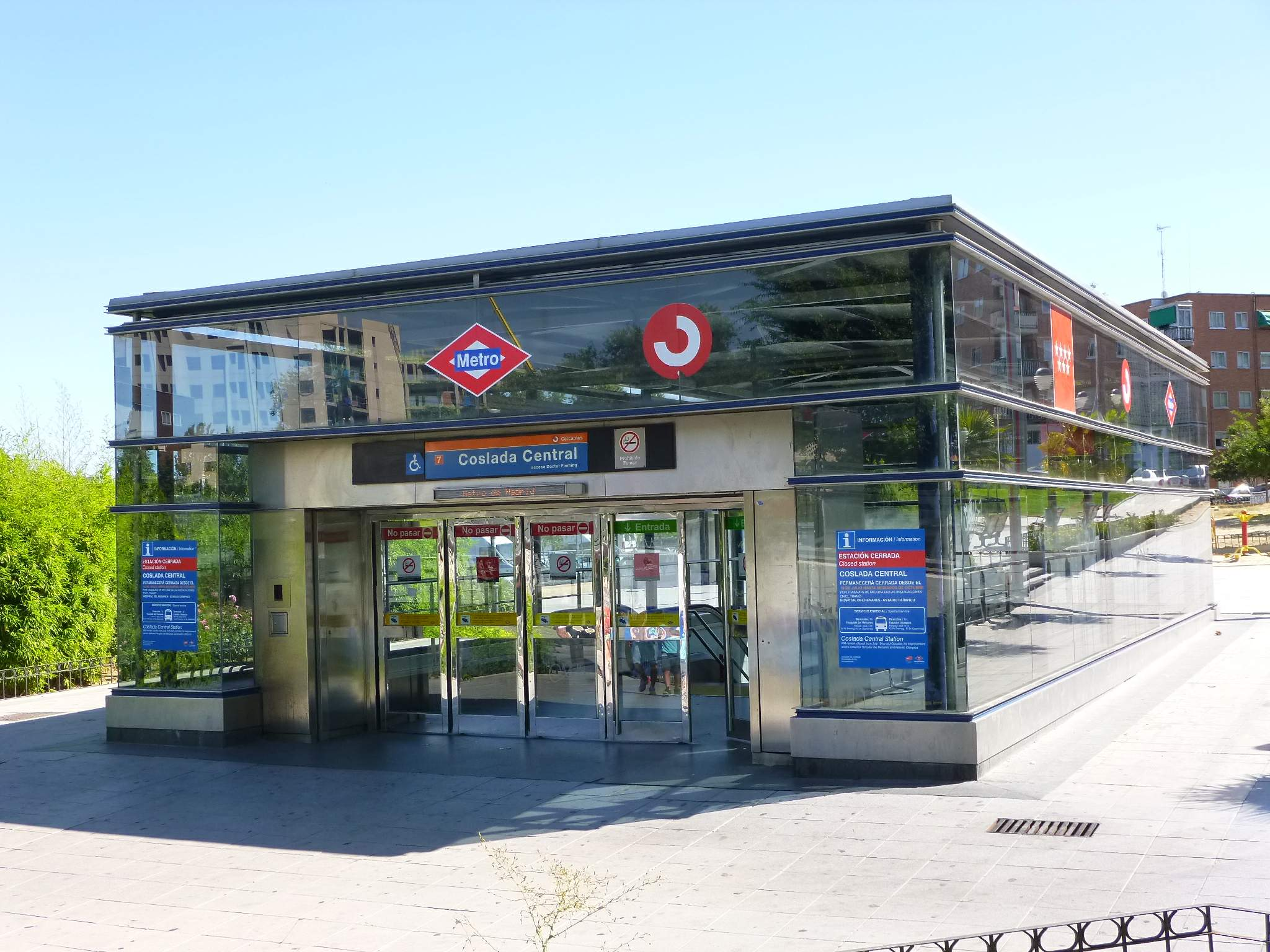 Estación de Coslada Central, de Madrid Metro y Renfe Cercanías